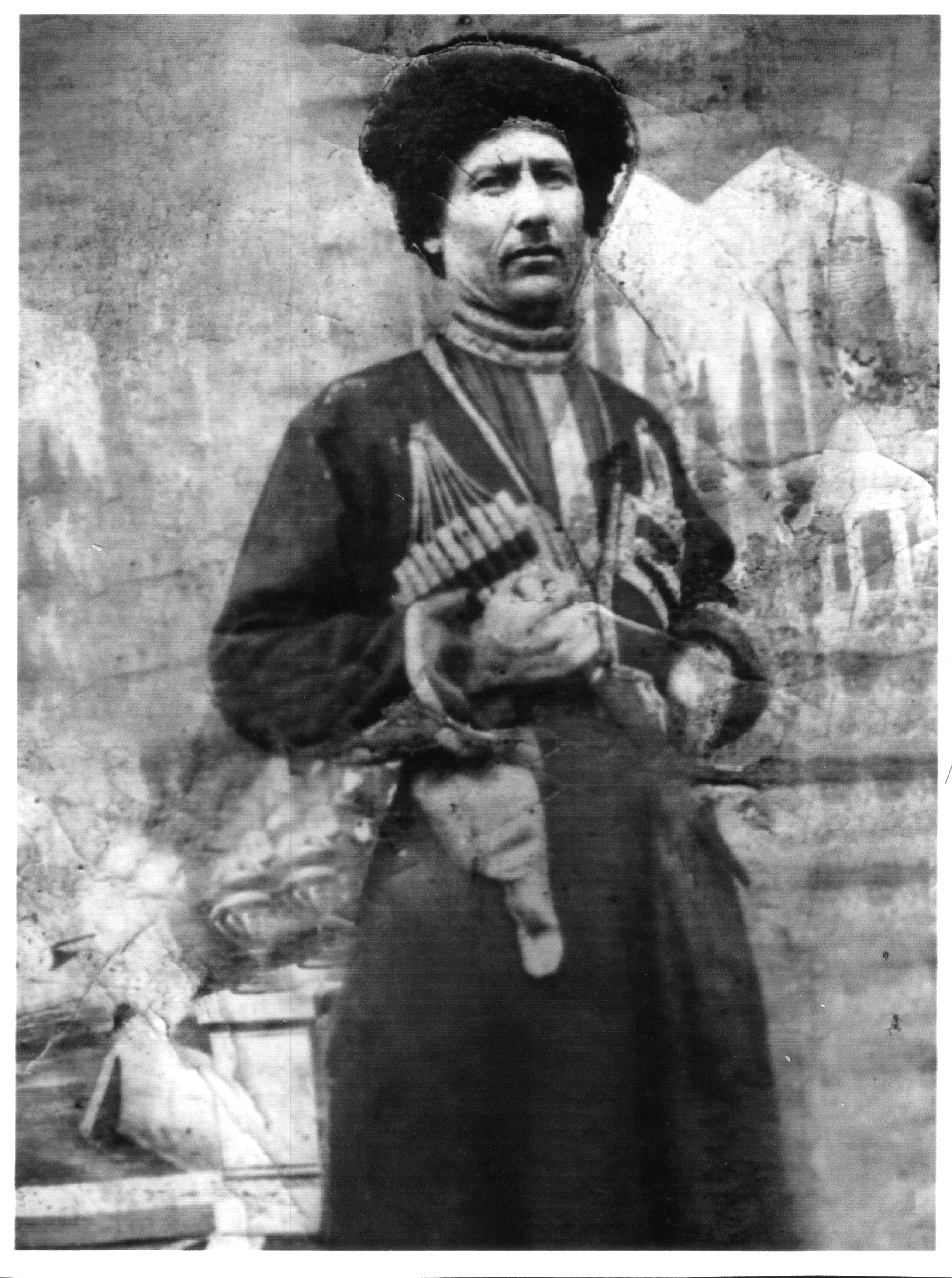 Никонор Хомуткин в форме Полицейского урядника